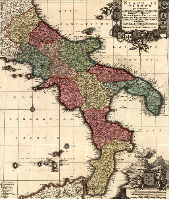 Organizzazione amministrativa del Regno di Napoli verso la metà del Settecento